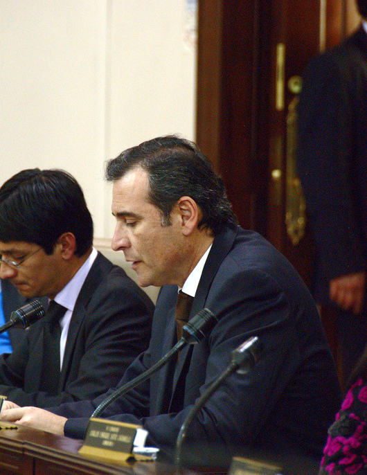 Intervención del Senador Juan Manuel Corzo en el primer Debate de la Ley Lleras en la Comisión primera del Senado.